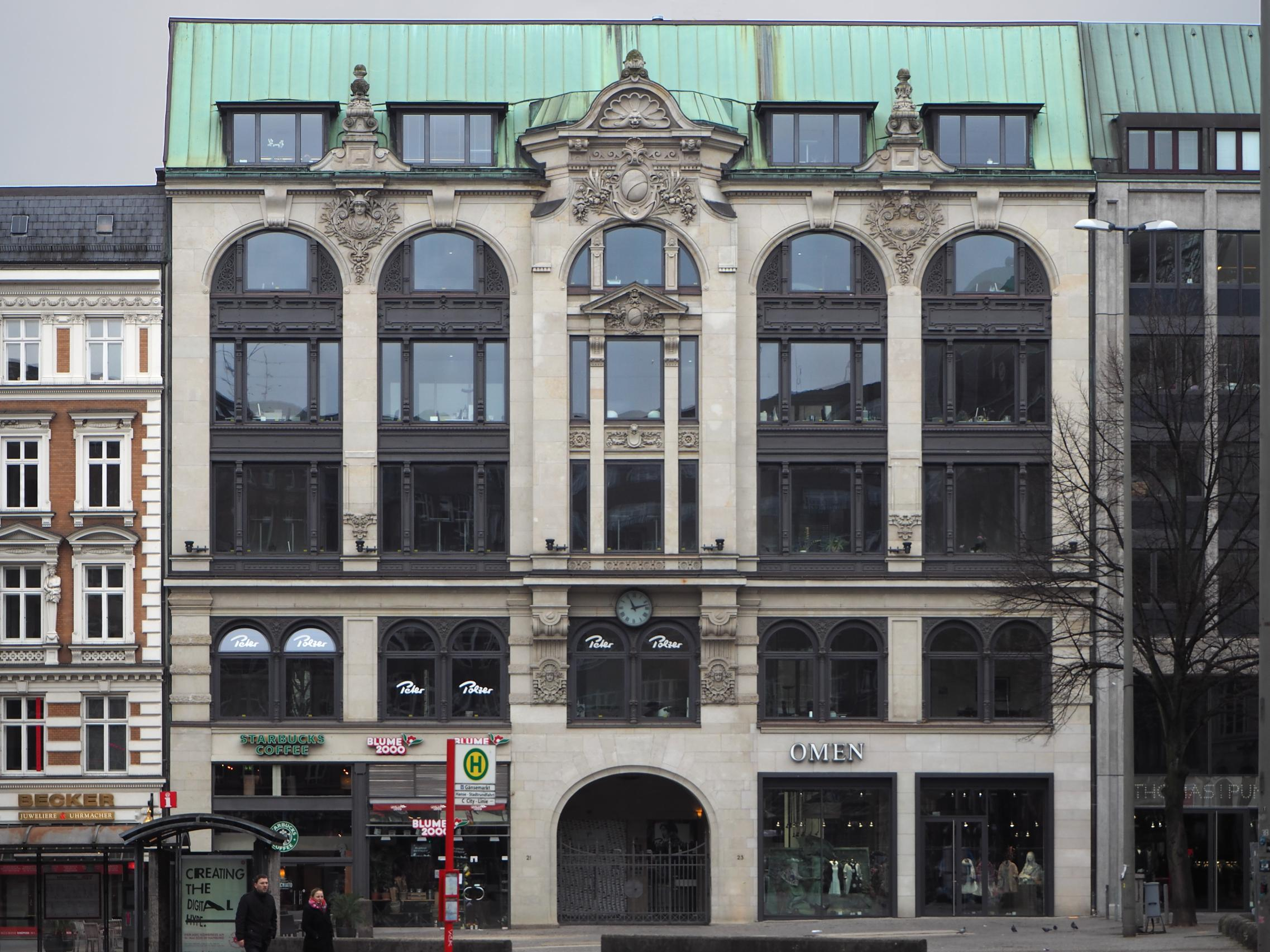 Hamburg, Gänsemarkt 21-23, Baujahr 1896, Foto: März 2015 This is a photograph of an architectural monument.